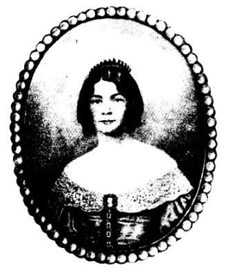 Imagen de la autora